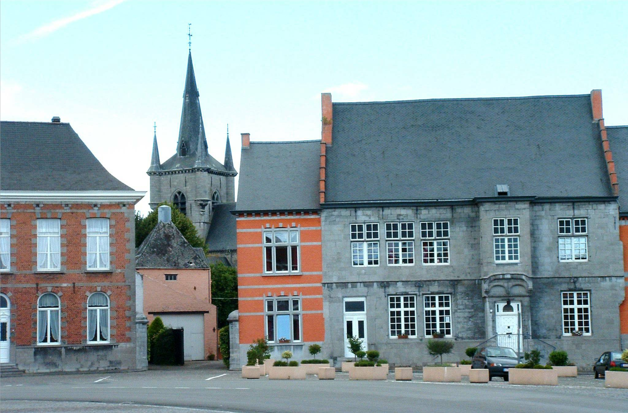 Foto: Guy Debognies (19/07/05)